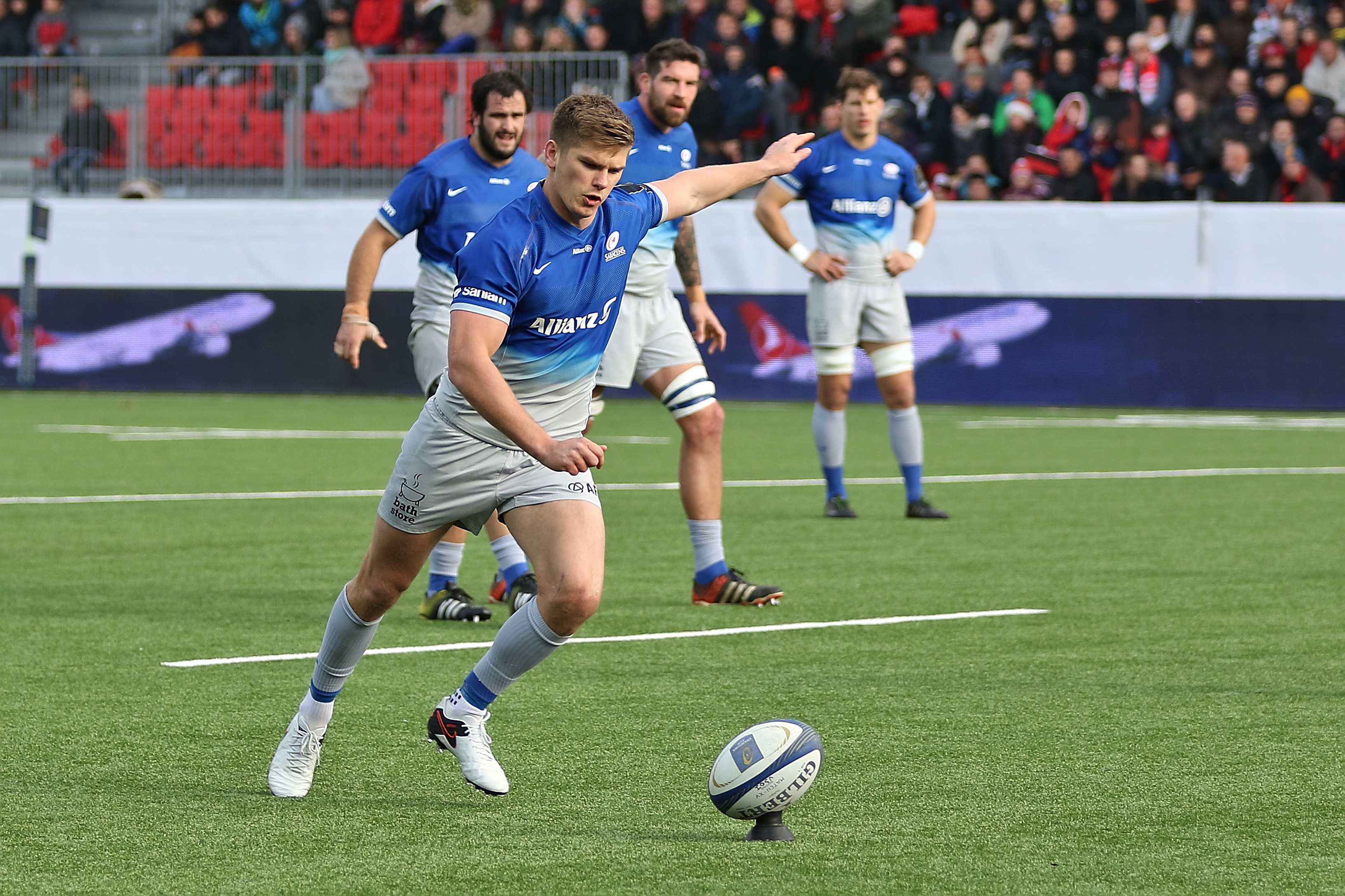 USO - Saracens - 20151213 - Owen Farrell